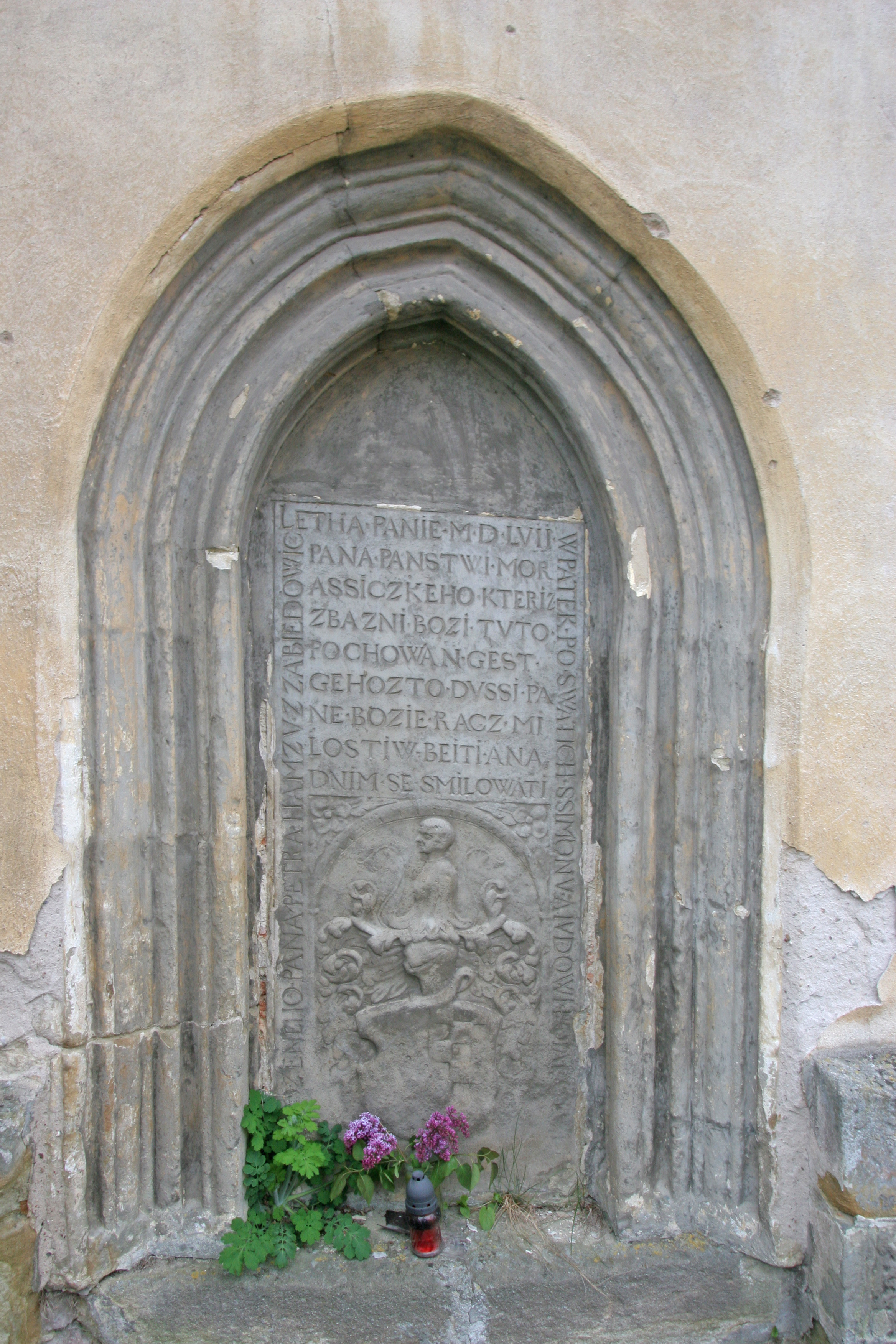 Morašice kostel svatého Víta